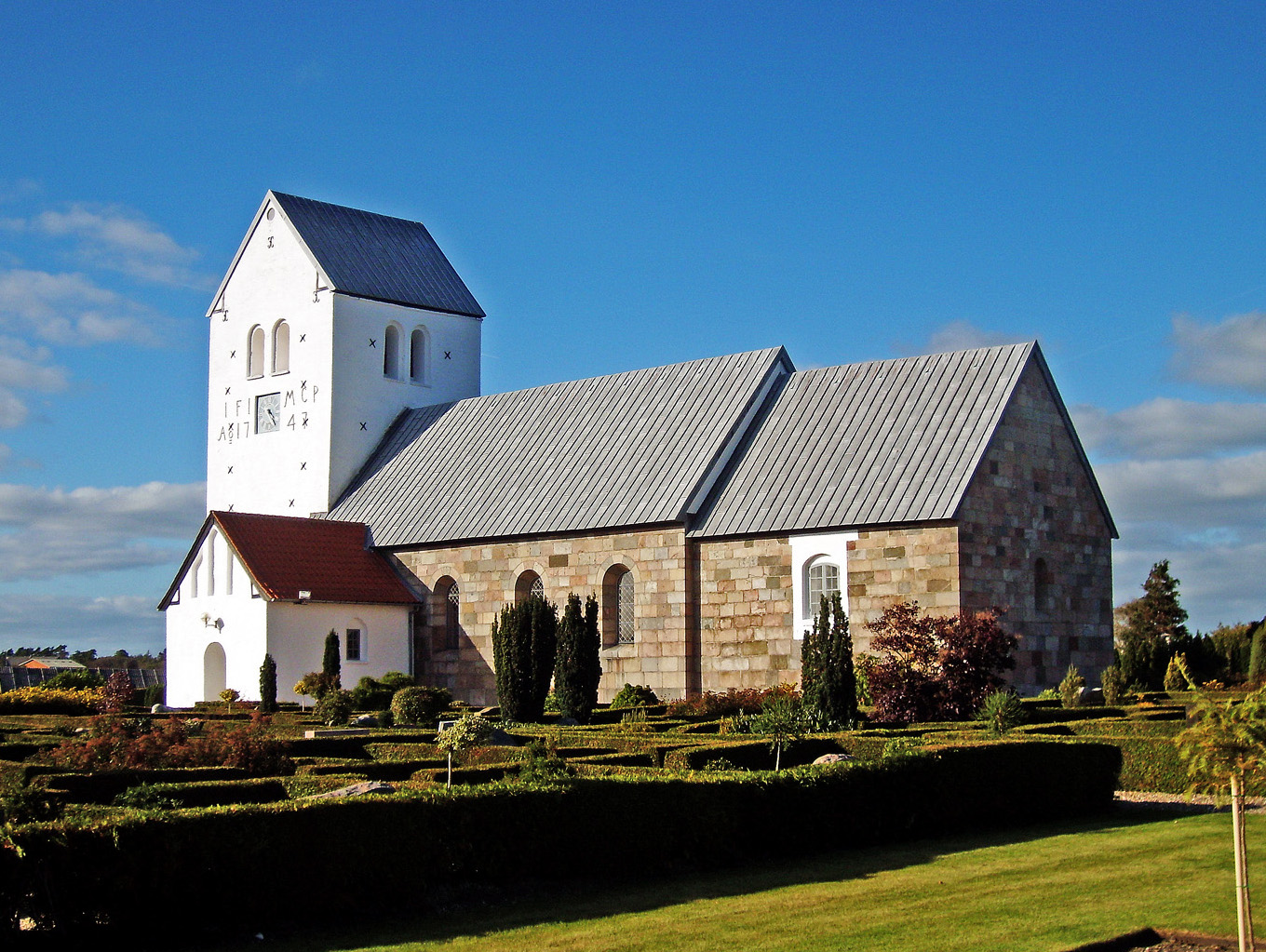 fra sydøst